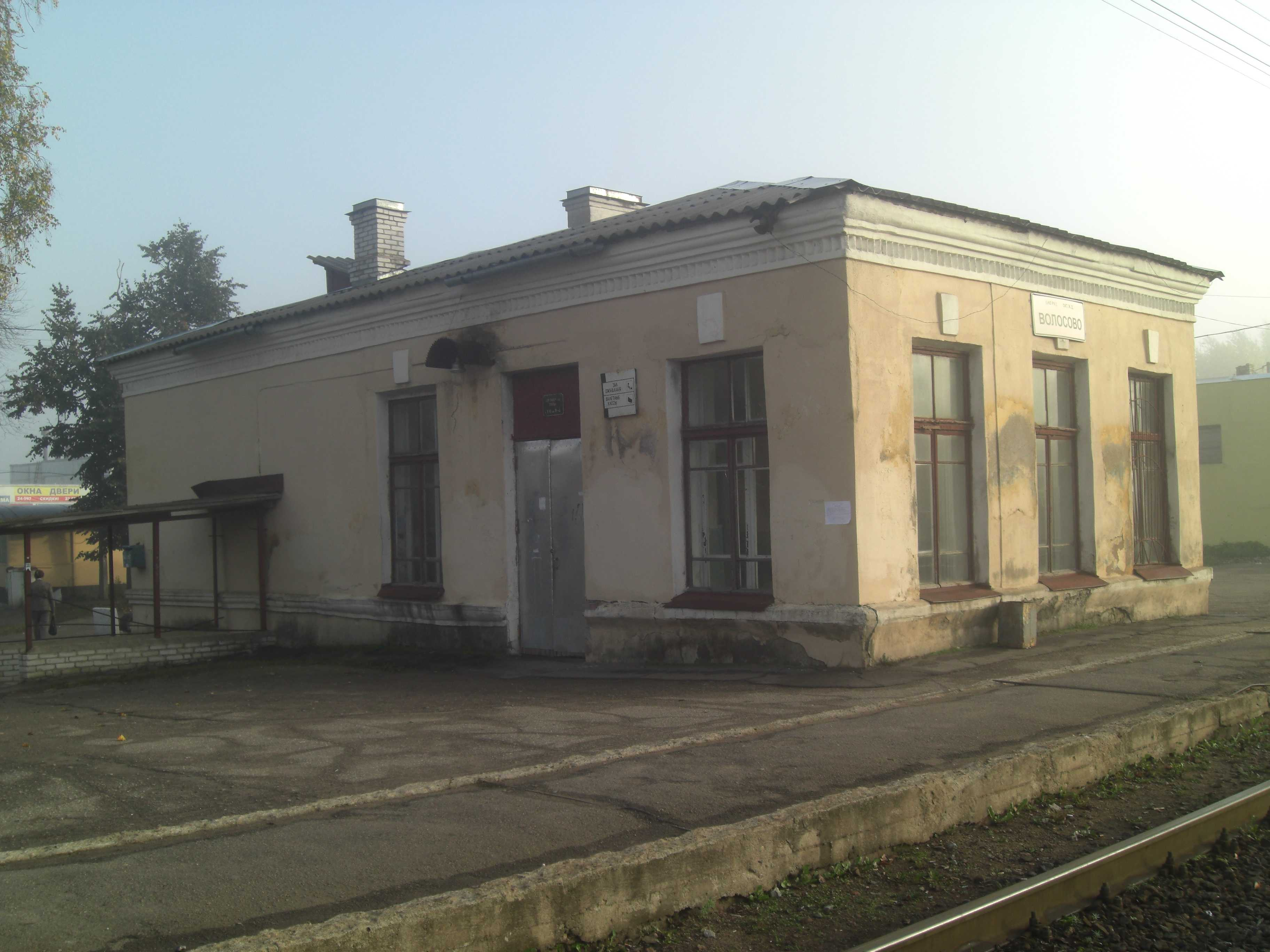 Bahnstation Wolossowo. Wolossowo Волосово.